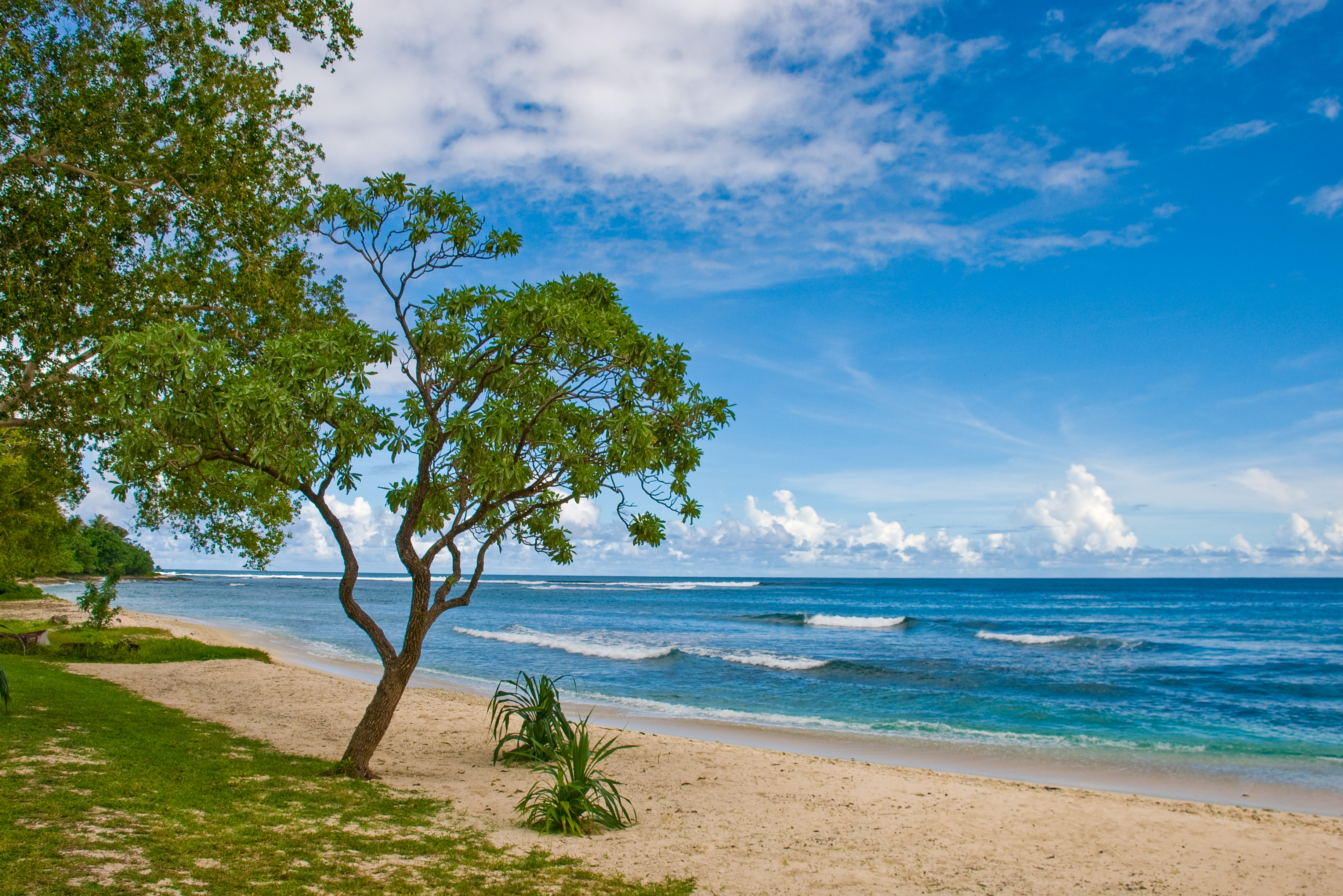 Eratap beach, Efate, Vanuatu